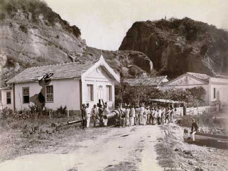 Trabalhadores movendo o tubo-alma de um canhão Withworth 72 libras. Parte da série de fotos de Juan Gutierrez documentando os preparativos das tropas para a Revolta da Armada, em 1894. Galeria do Museu Histórico Nacional.